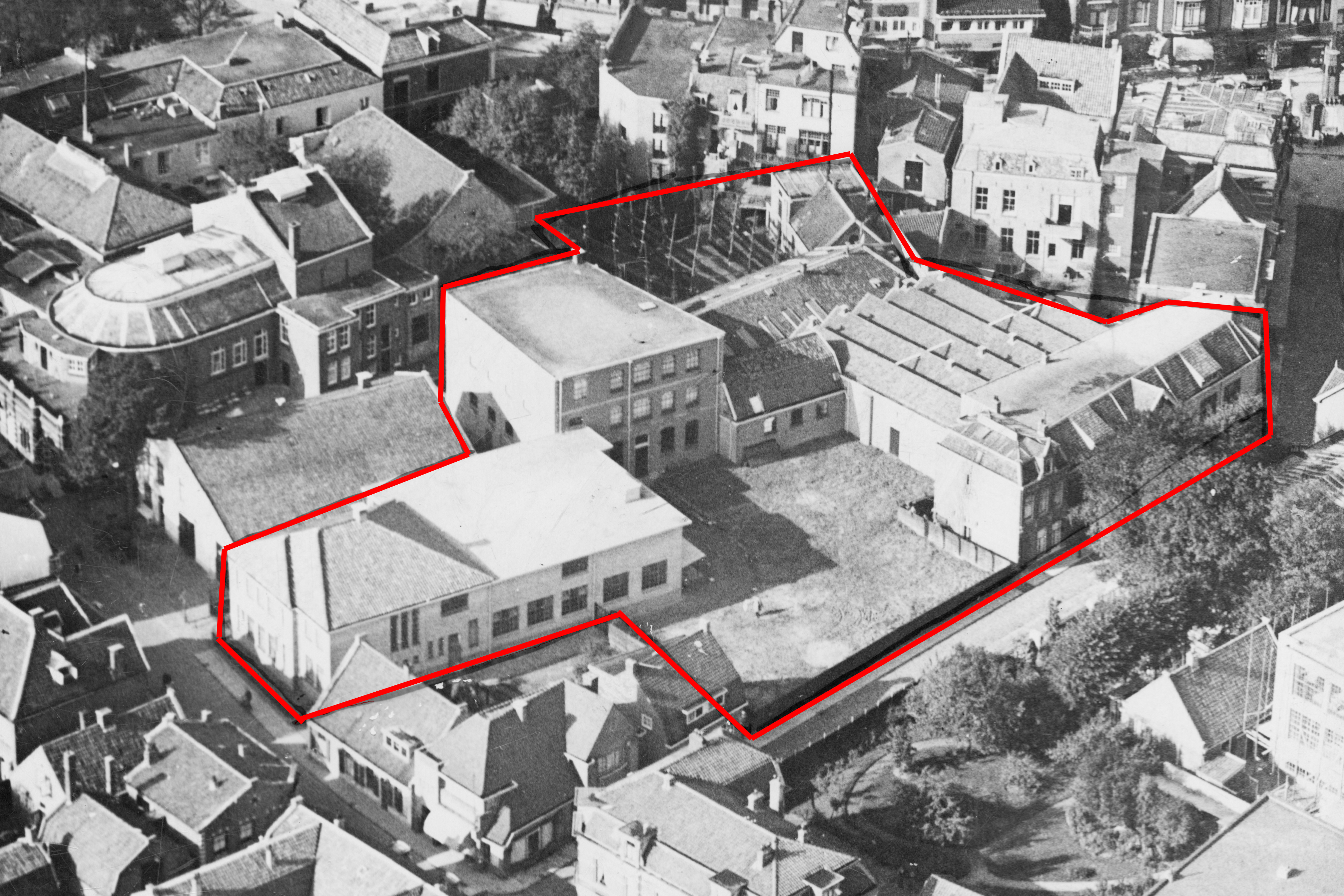 Luchtfoto van de fabriek in Hilversum.